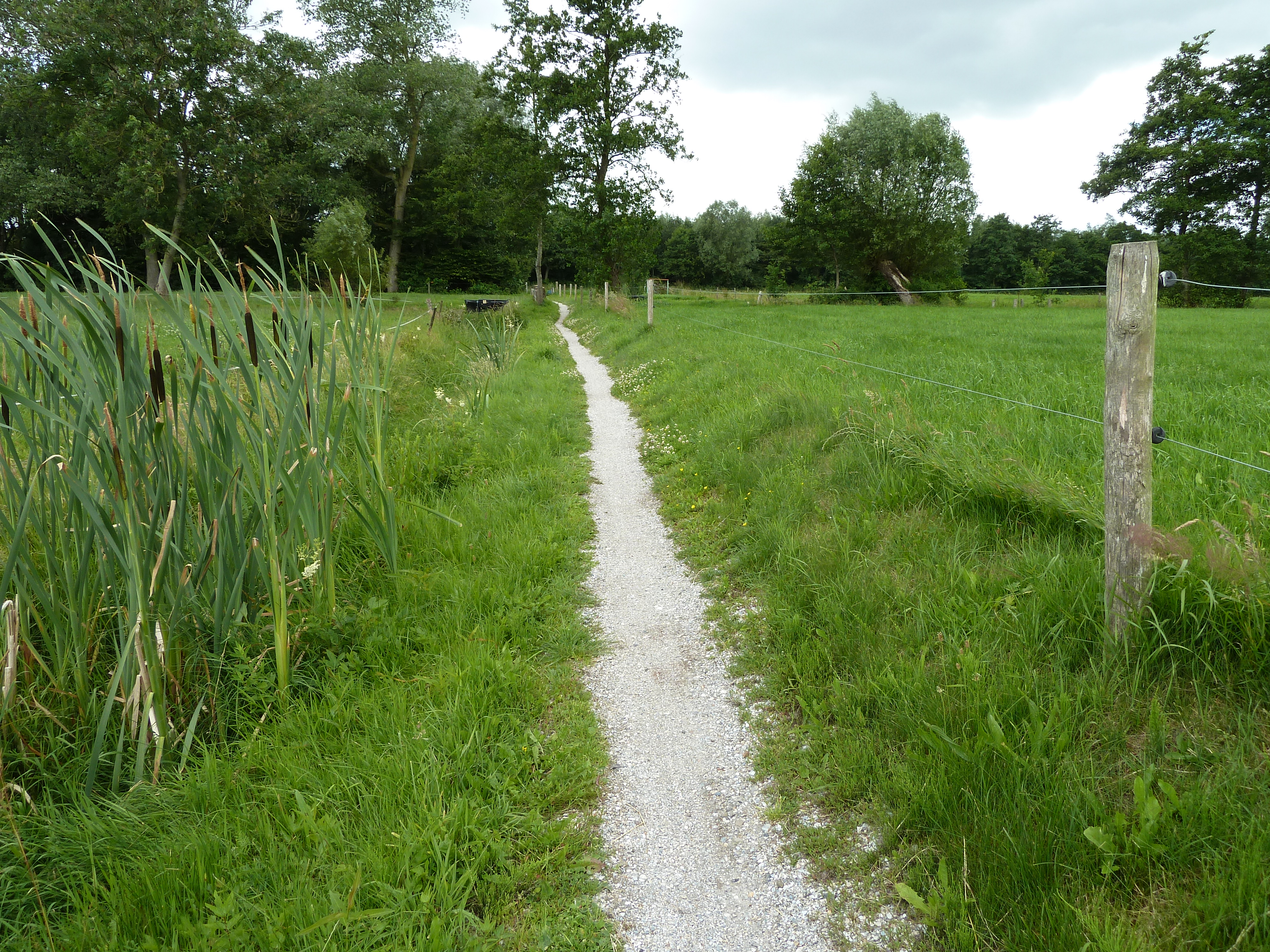 Stukje van het Malijksepad